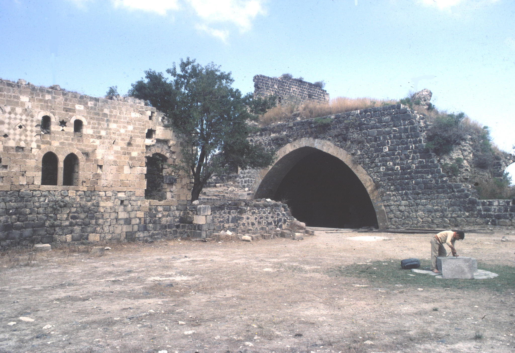 Forteresse de Margat